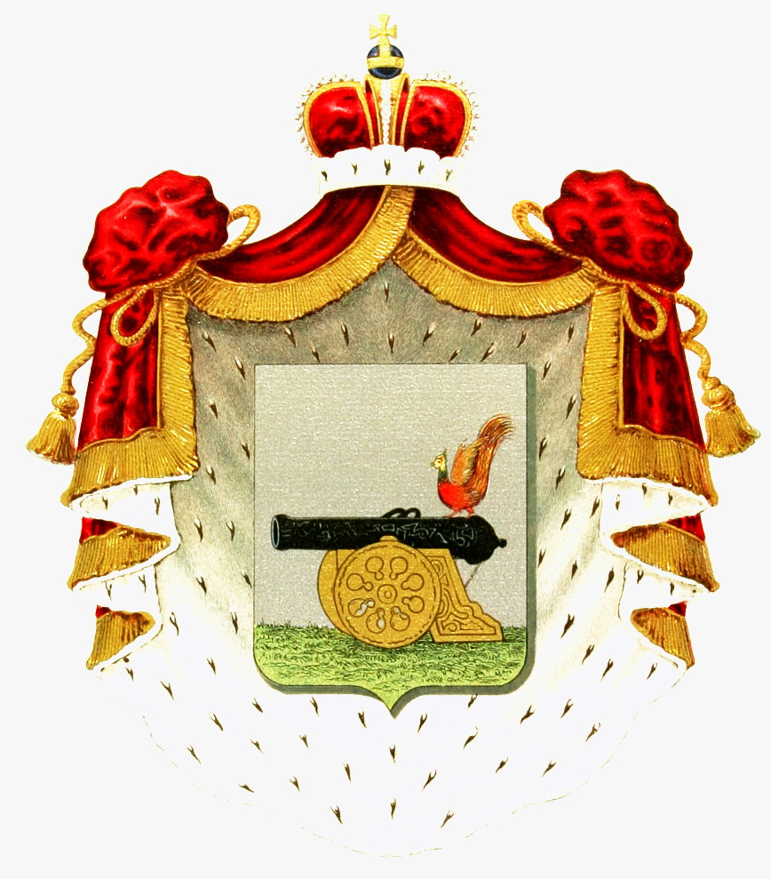 Герб рода князей Ржевских